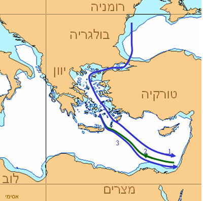 אוניית המעפילים אסימי - מסלול